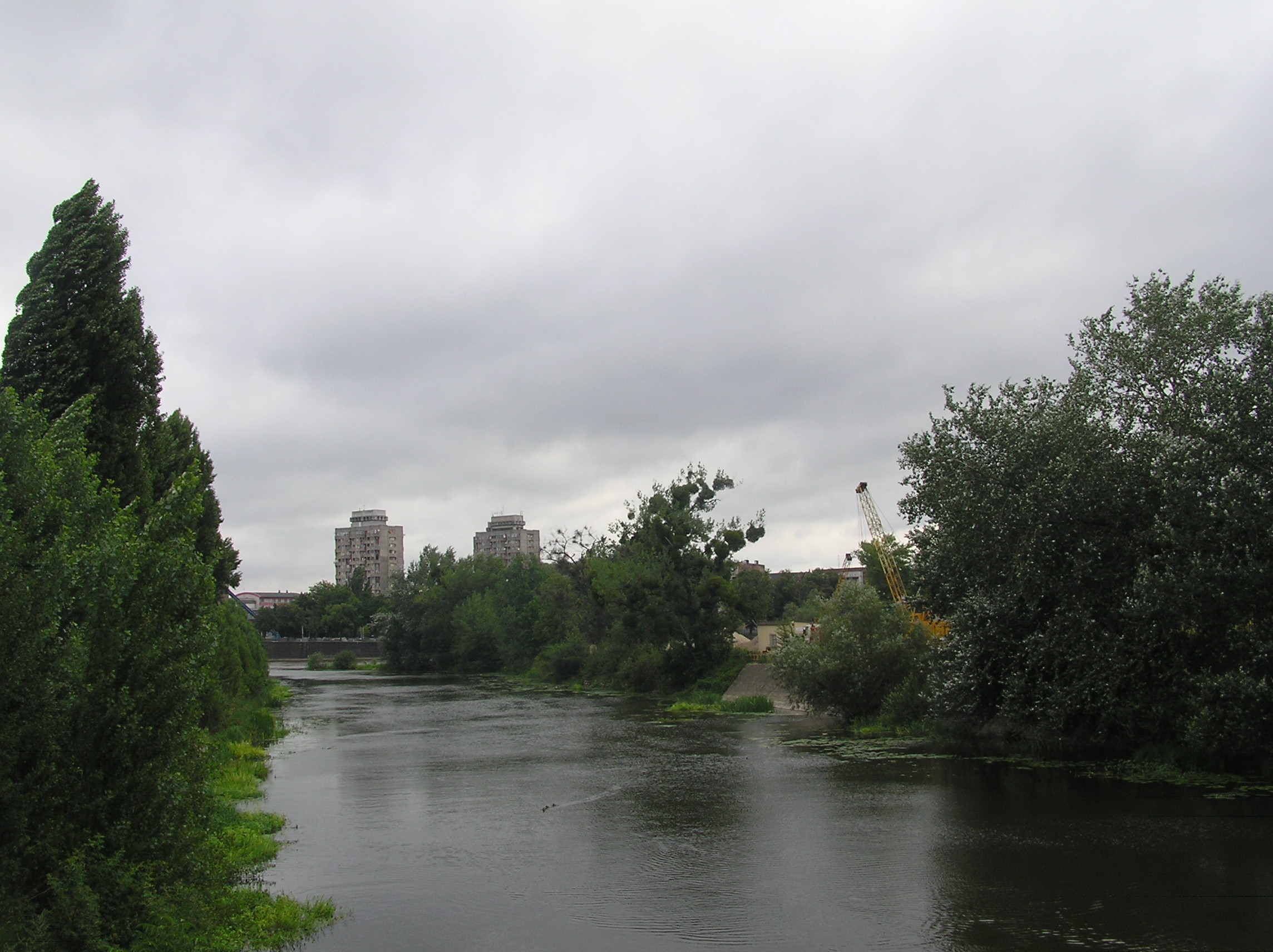 Ujście Oławy